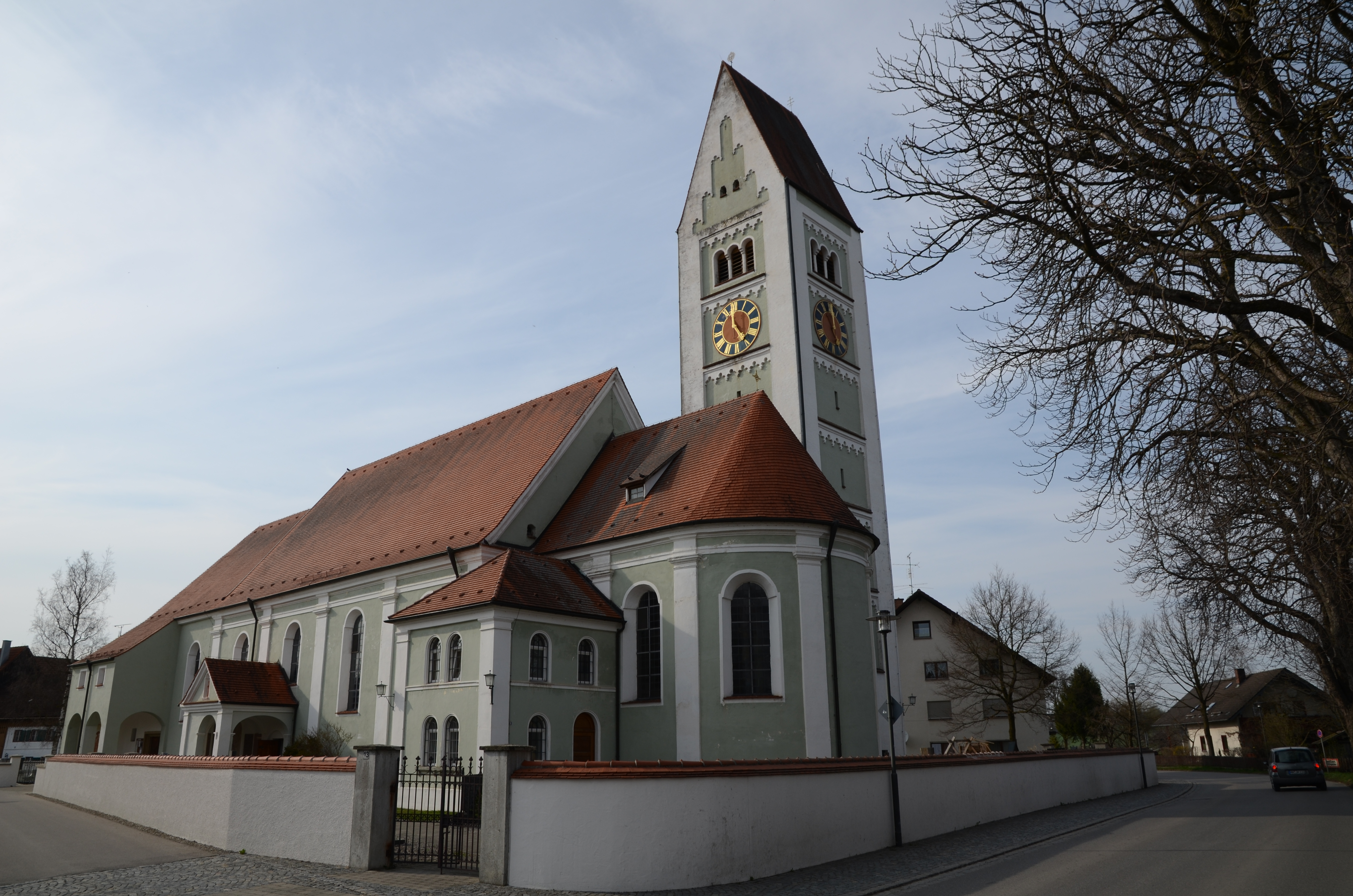 Kath. Pfarrkirche Mariä Himmelfahrt in Erkheim